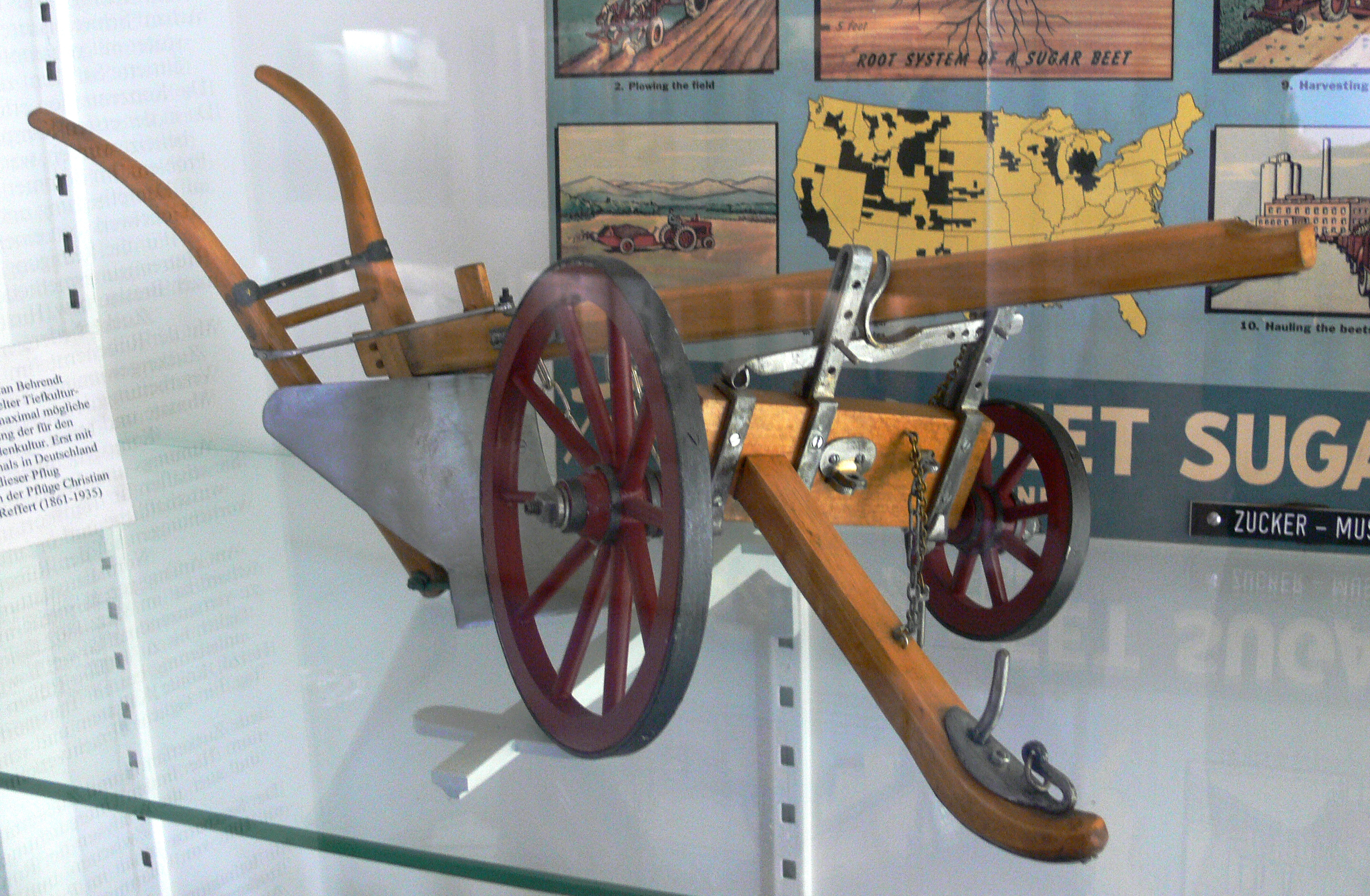 Modell des „Wanzleber Pflugs“ für den Zuckerrübenanbau, von Schmiedemeister Christian Behrendt (1819–1902) entwickelter und 1852 vorgestellter Tiefkulturfplug (wurde erst durch die Einführung der Dampfpflüge in den 1860er Jahren überholt) Zucker-Museum, Berlin